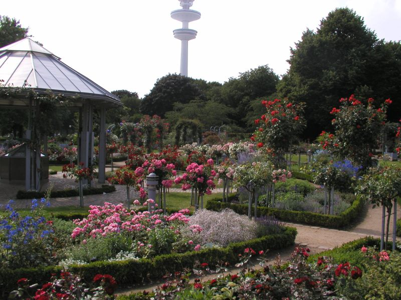 Rosengarten im Park Planten un Blomen, Hamburg.